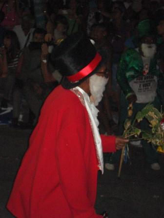 Gramillero de comparsa montevideana